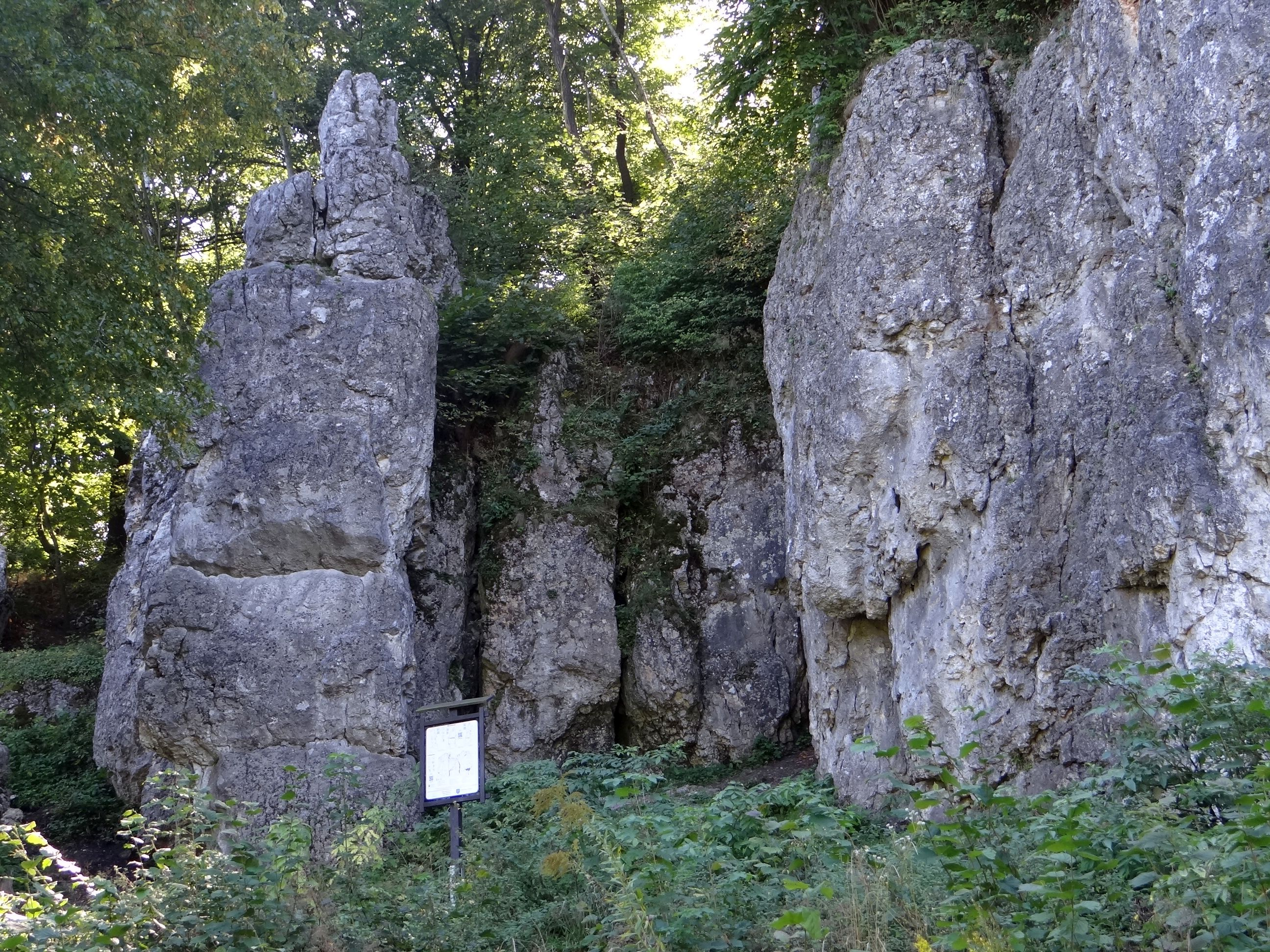 Mniszkowa w Grupie Łabajowej w Dolinie Będkowskiej